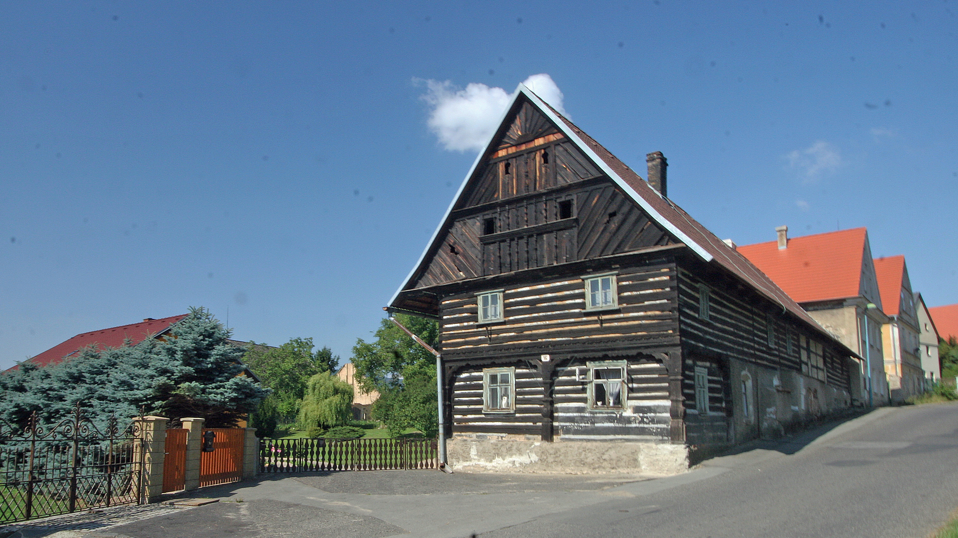 Venkovský dům (Starý Týn), Starý Týn 15